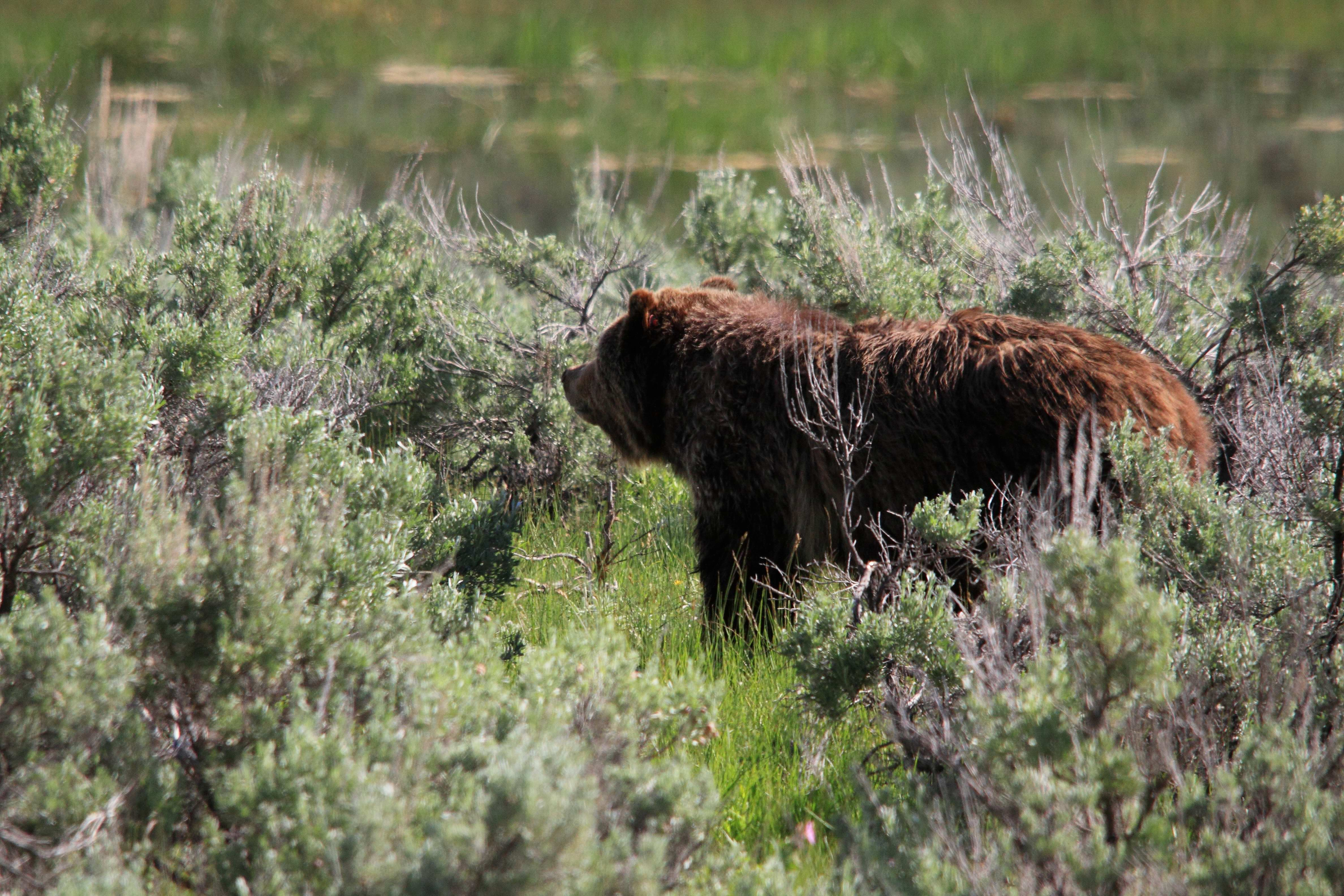 Yellowstone Grizzly